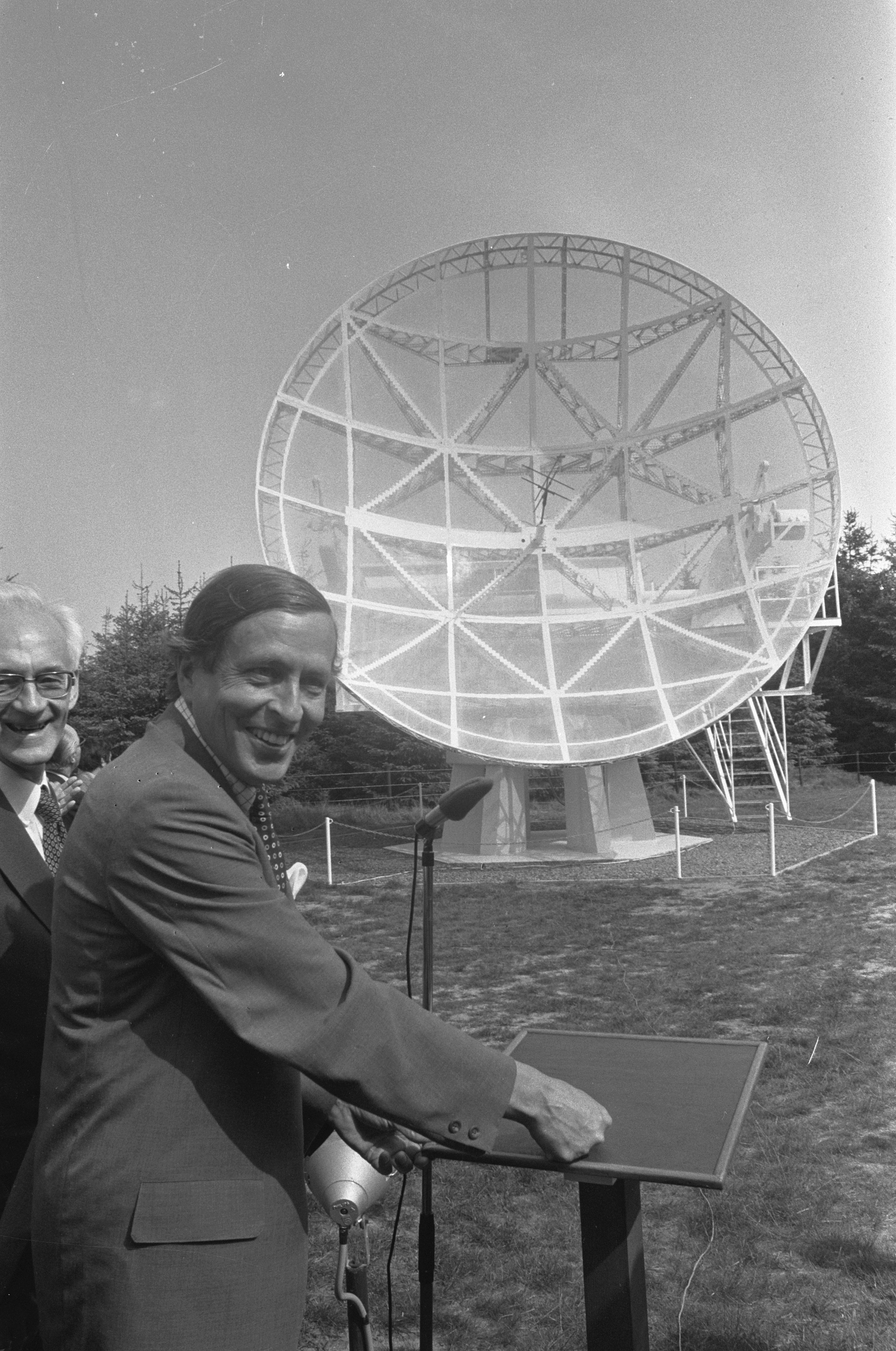 Collectie / Archief : Fotocollectie Anefo Reportage / Serie : [ onbekend ] Beschrijving : Prins Claus bij in gebruikstelling radiotelescoop van "Simon Stevins Volkssterrenwacht in Hoeven (NB); Prins Claus drukt op de knop Datum : 18 mei 1974 Locatie : Hoeven Trefwoorden : prinsen, telescopen Persoonsnaam : Claus, prins Fotograaf : Peters, Hans / Anefo Auteursrechthebbende : Nationaal Archief Materiaalsoort : Negatief (zwart/wit) Nummer archiefinventaris : bekijk toegang 2.24.01.05 Bestanddeelnummer : 927-1998